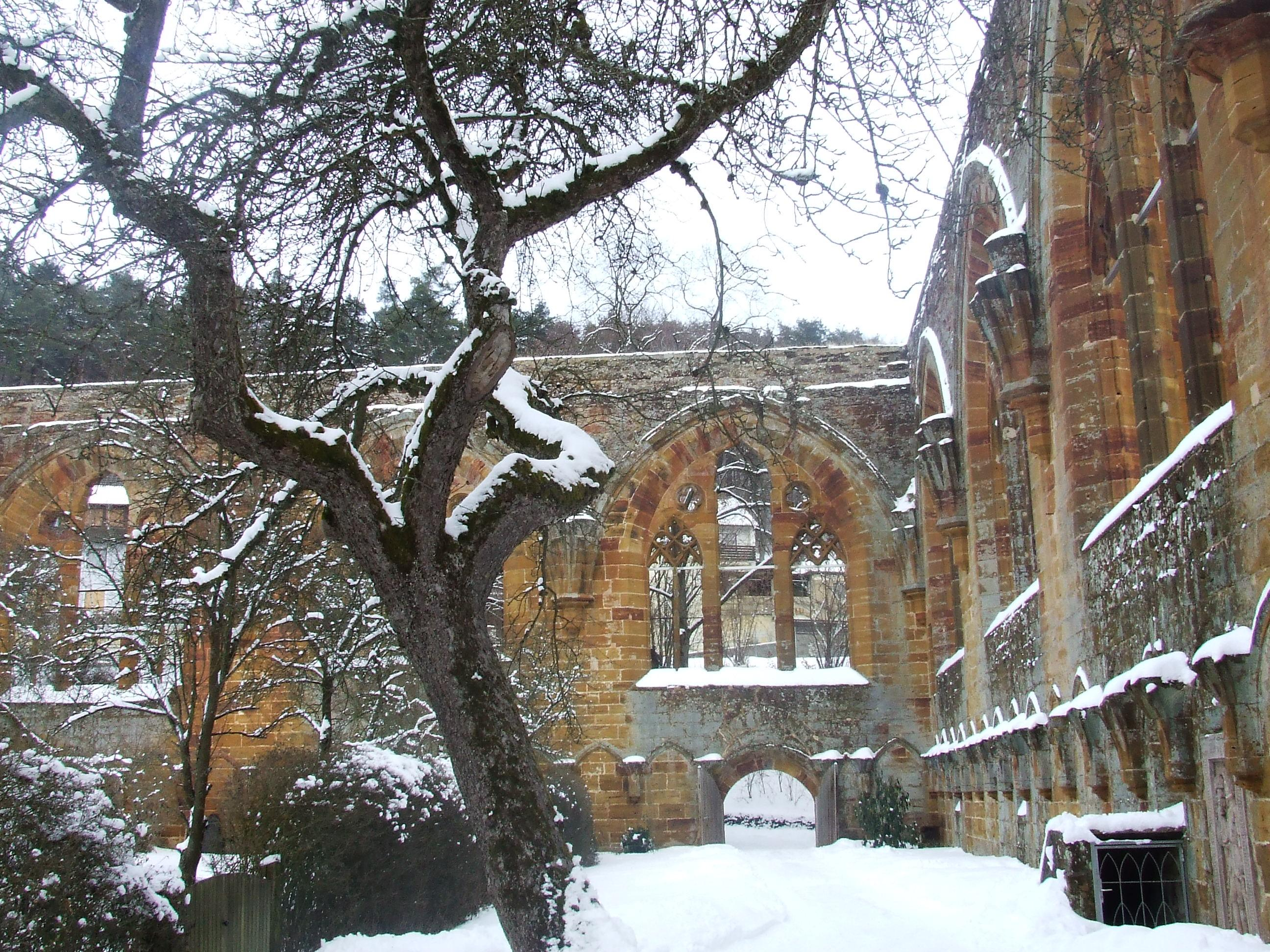 Landkreis Neumarkt, Gemeinde Berg, Ruine der Klosterkirche des ehemaligen Birgittenklosters Gnadenberg, innen Blick nach Osten, Winter 2006